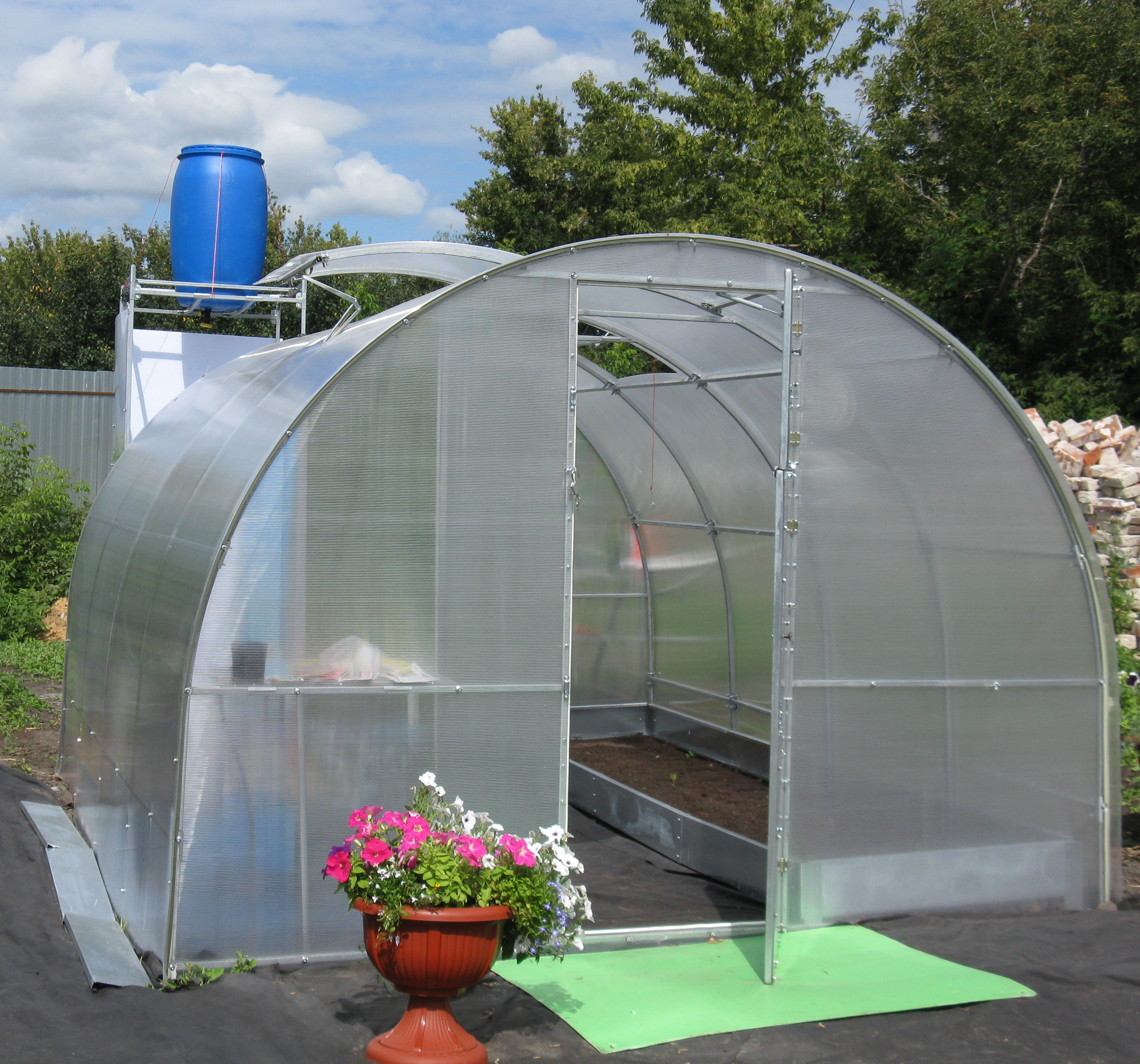 Петуния в кашпо